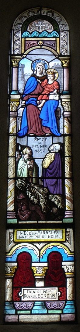 Vitrail de la chapelle Notre-Dame-de-Beauvais sise à Le Theil de Bretagne (35). N.D. des Miracles et Vertus de Rennes.